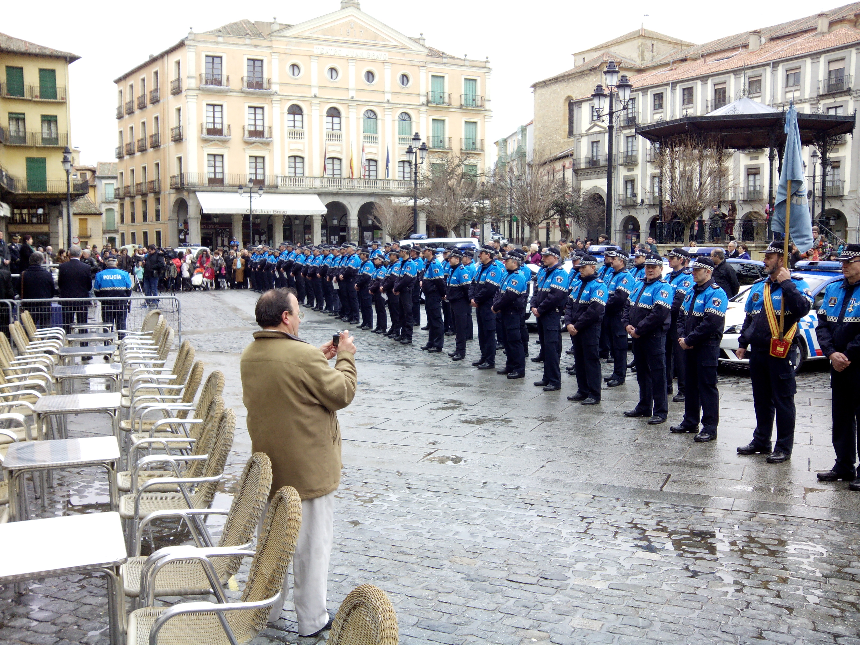 Agentes de la Policía local formando en la Plaza Mayor de Segovia.